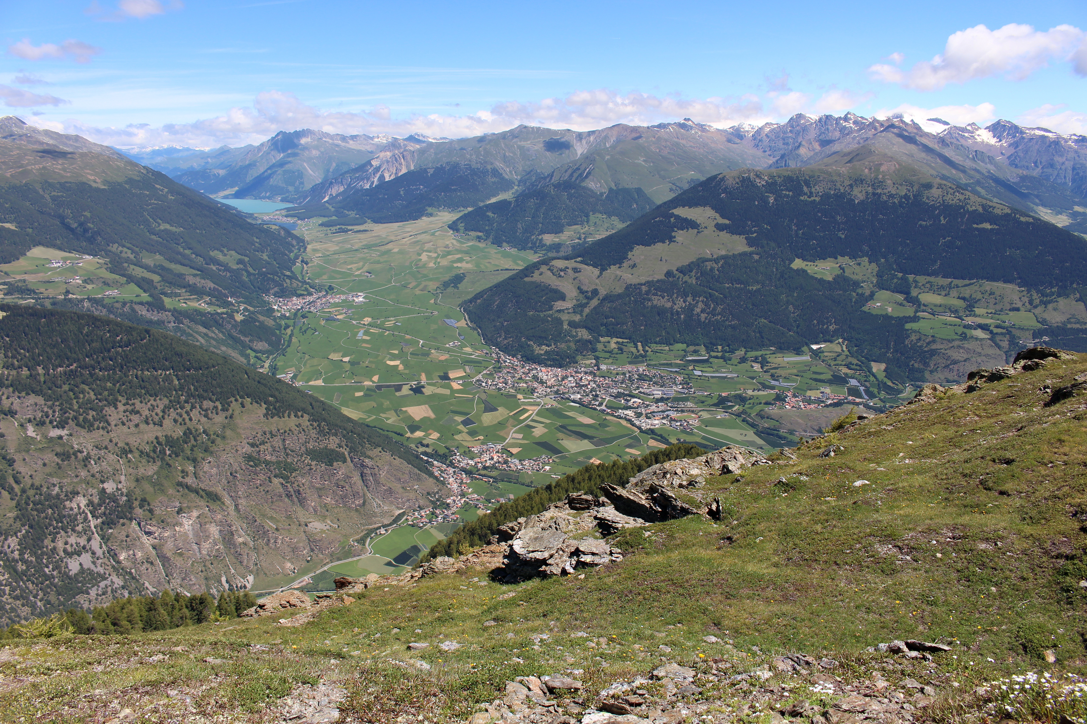 Gigantischer Ausblick vom Gipfel des Glurnser Köpfl in Richtung Mals, Laatsch, Burgeis, Haider- und Reschensee. Das Glurnser Köpfl (italienisch Monte di Glorenza) ist ein 2395 m.ü.M. hoher Berg. Er gehört zu den nördlichen Ortler-Alpen im Westen von Südtirol.